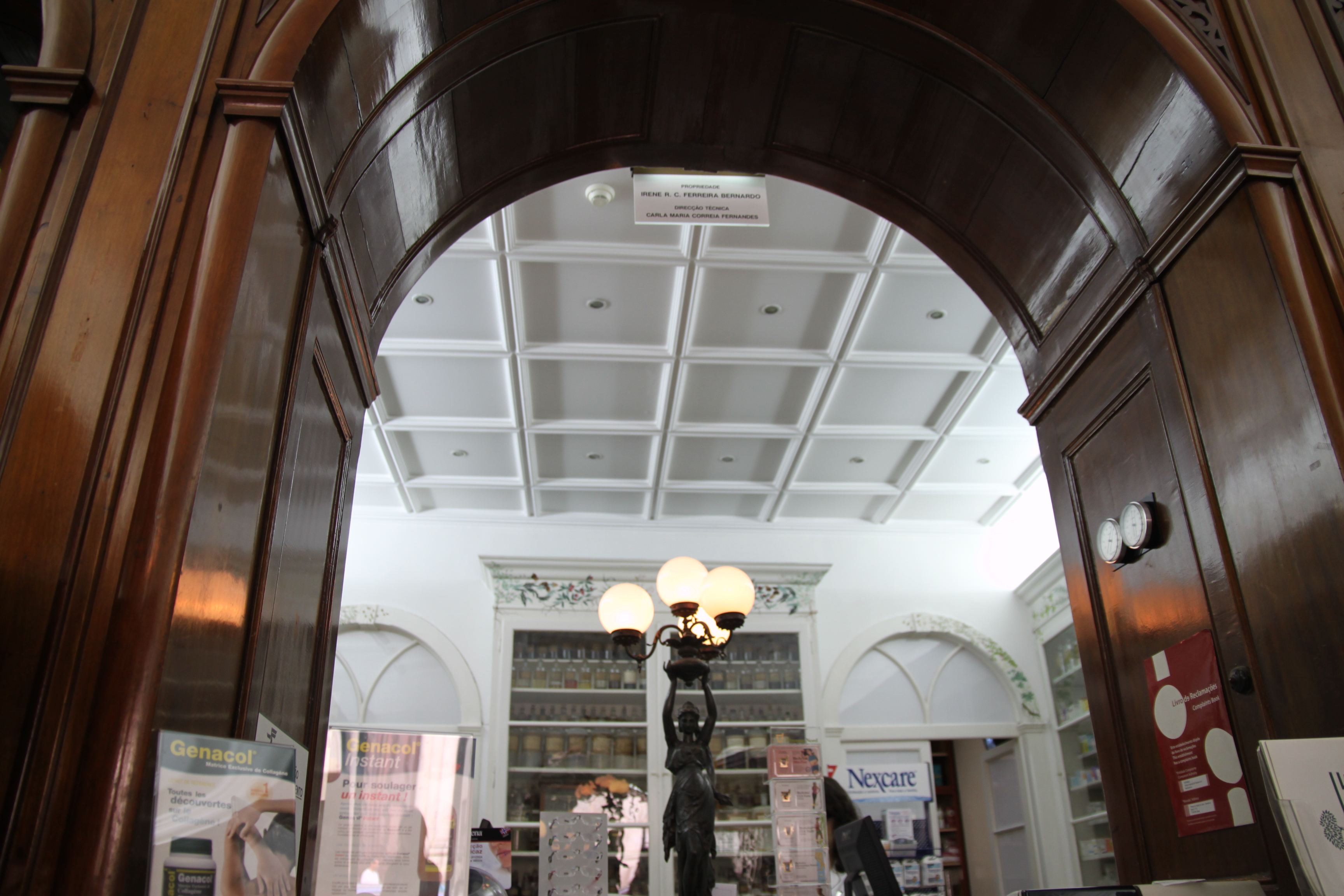 Farmácia Durão This file was uploaded for Wiki Loves Monuments in Portugal with the unique identifier 97020897.